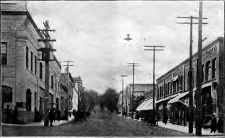 Hood River, Oregon circa 1920